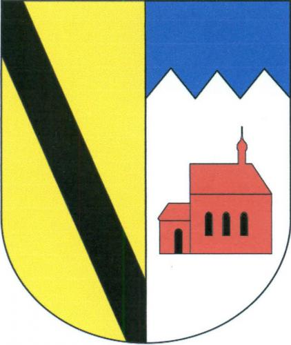 Rušinov znak